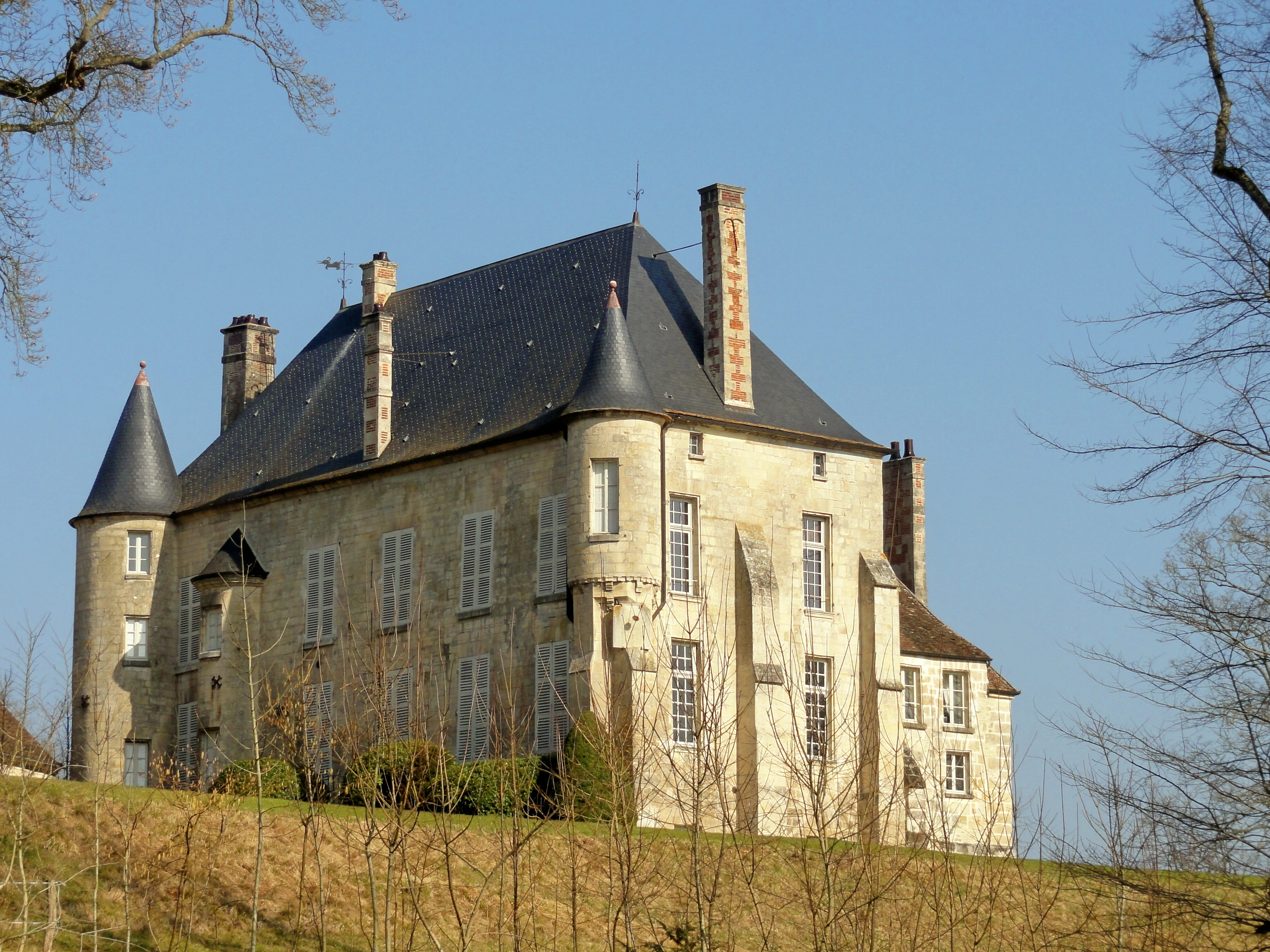 Vue depuis le sud-ouest.